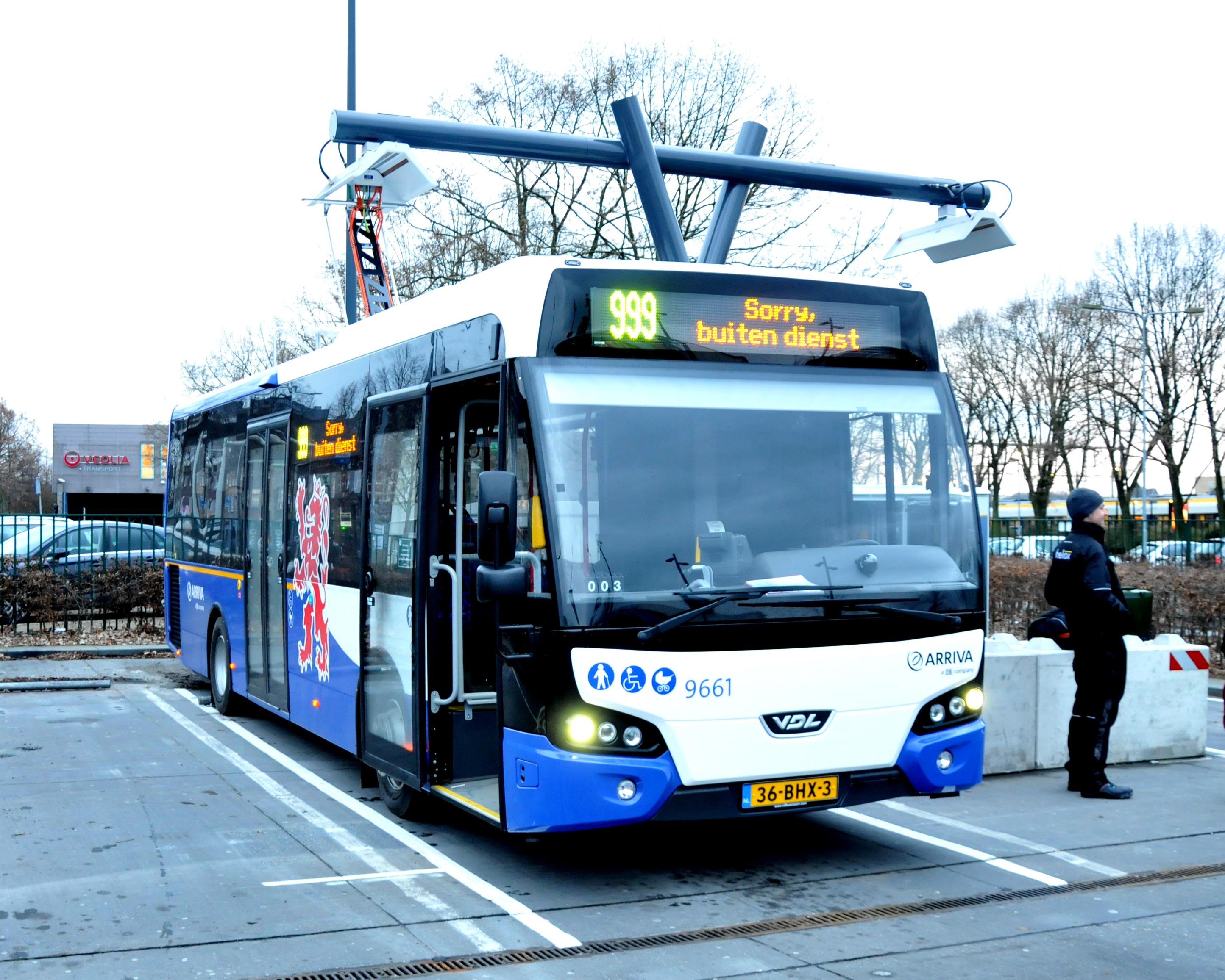 Arriva bus 9661 van het VDL type Citea LLE 99/Electric (bj: 2016) bij busstation Venlo.